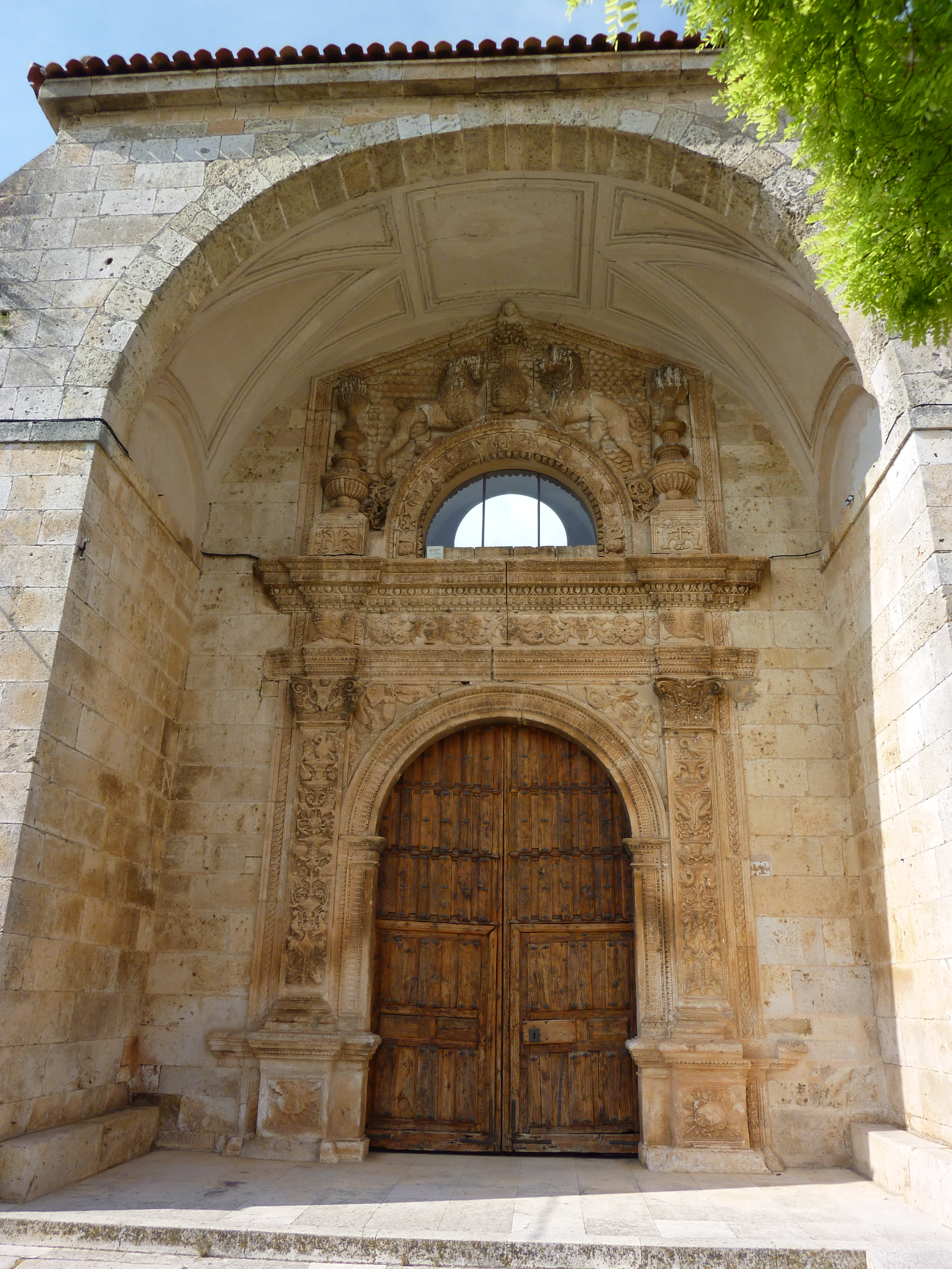 Portal de la iglesia de Santa Eulalia, Arauzo de Miel, provincia de Burgos, España.